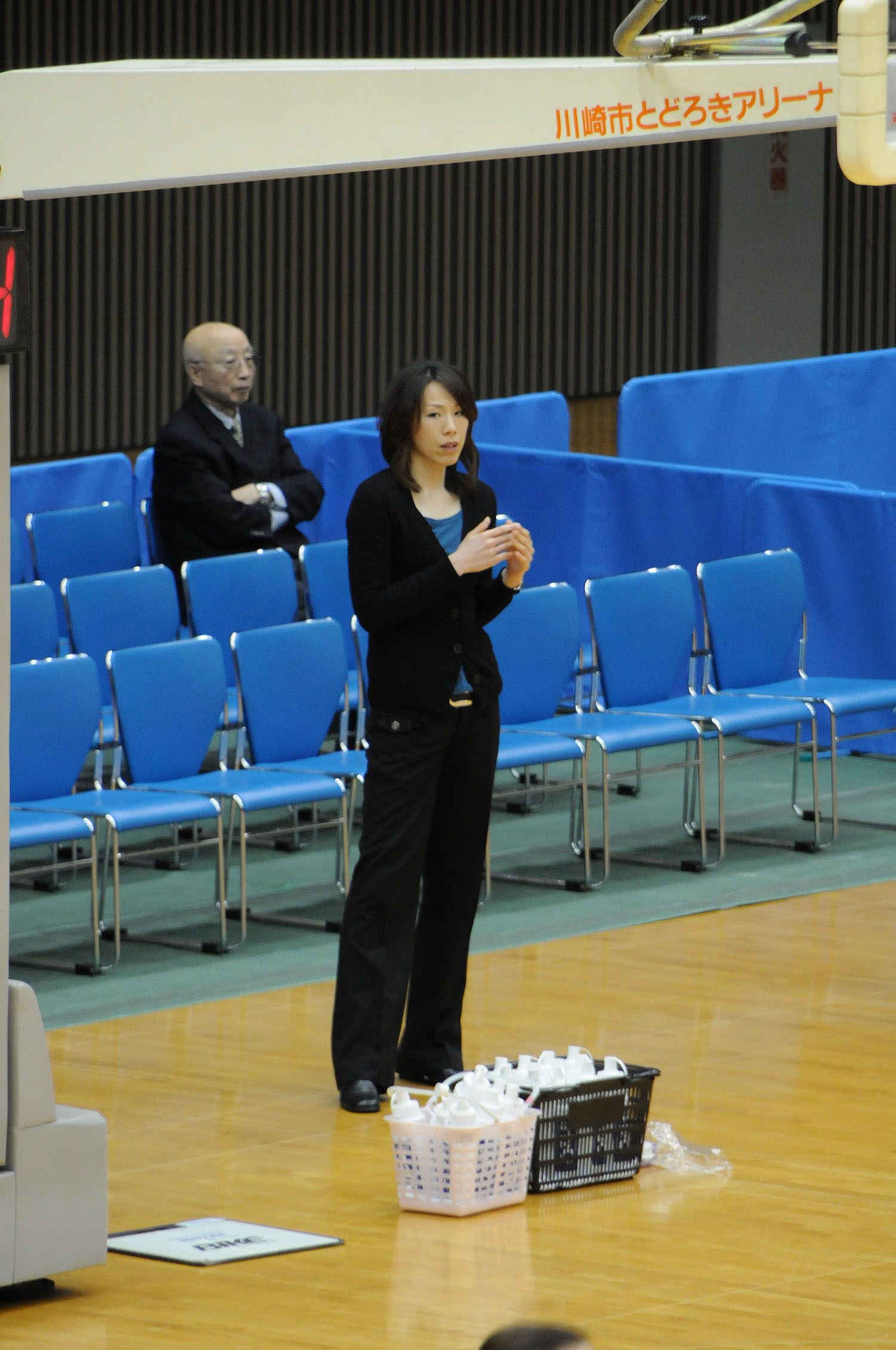 富士通レッドウェーブ、岡里明美コーチ。とどろきアリーナで。